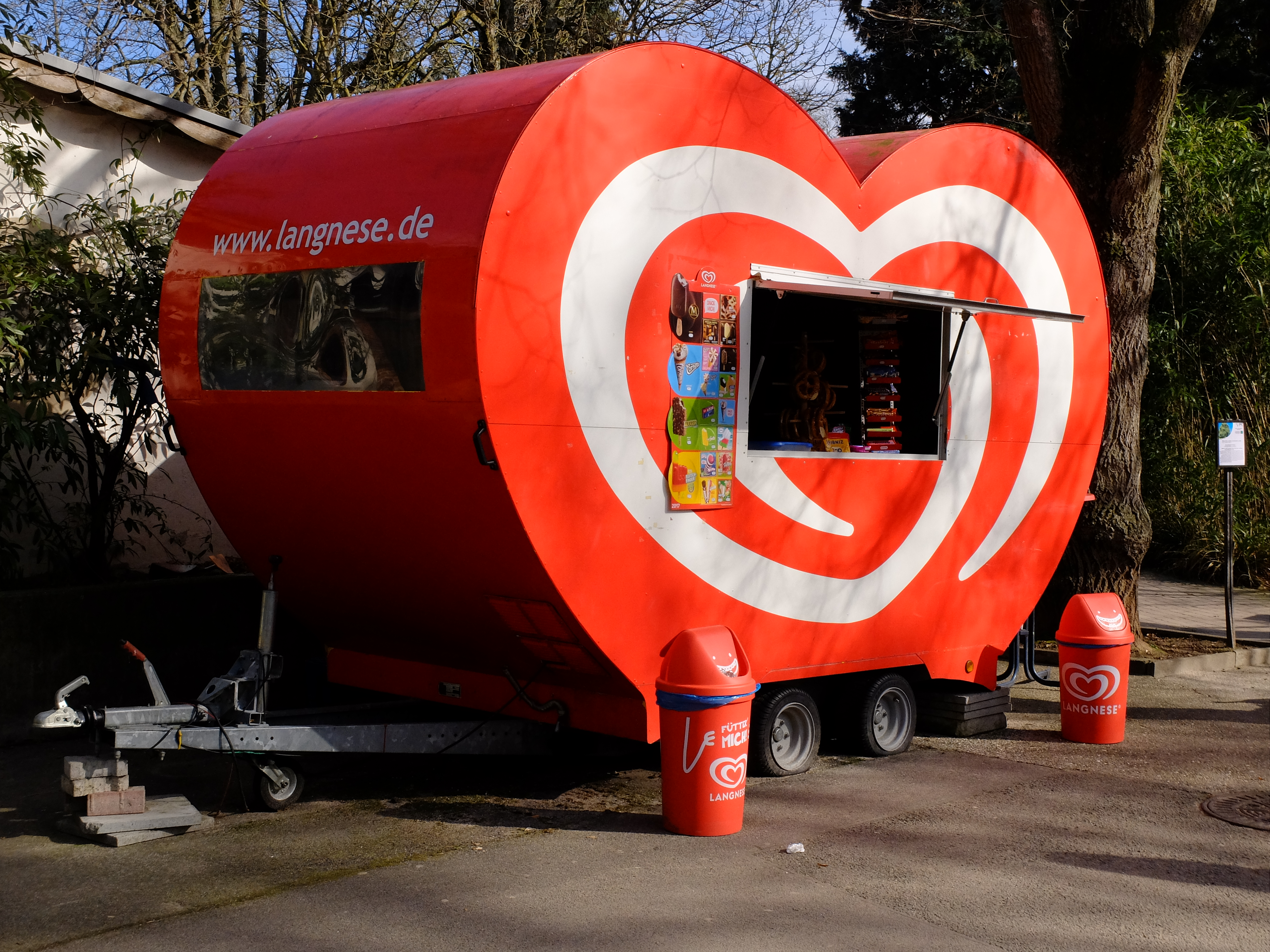 Langnese-Verkaufsstand im Zoo Heidelberg